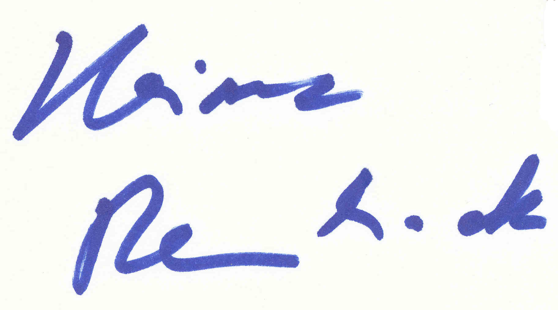 Autogramm von Heinz Rennhack aus der Sammlung von Udo Grimberg